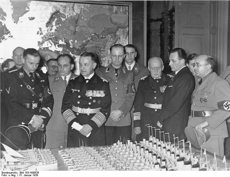 Scherl: Eröffnung des Seegeltungs- Instituts Magdeburg des Reichsbundes Deutscher Seegeltung Nach der feierlichen Eröffnung am Sonnabend Nachmittag besichtigte der Oberbefehlshaber der Kriegsmarine den Ausstellungsraum des Seegeltungs- Instituts, der neben künstlerischen Bildtafeln über die Entwicklung der Seefahrt- Modelle der in den ersten vier Jahren des Dritten Reiches vom Stapel gelaufenen Schiffen der Kriegs- und Handelsmarine zeigt. UBz Generaladmiral Dr.h.c. Raeder, (links dahinter) Reichsstatthalter Gauleiter Jordan, (rechts dahinter) den wissenschaftlichen Leiter des Instituts Dr. Kiefer, den Leiter des Reichsbundes Deutscher Seegeltung Vizeadmiral von Trotha und den stellv. Leiter Krohne. 15. 1. 38